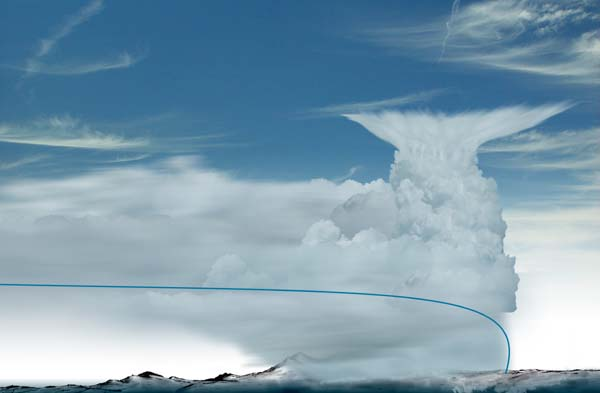 Řez studenou frontou.